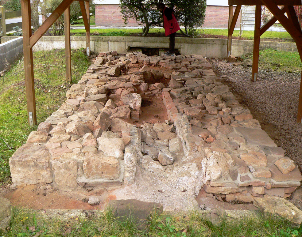 Glasmanufaktur Holzen, Hauptofen